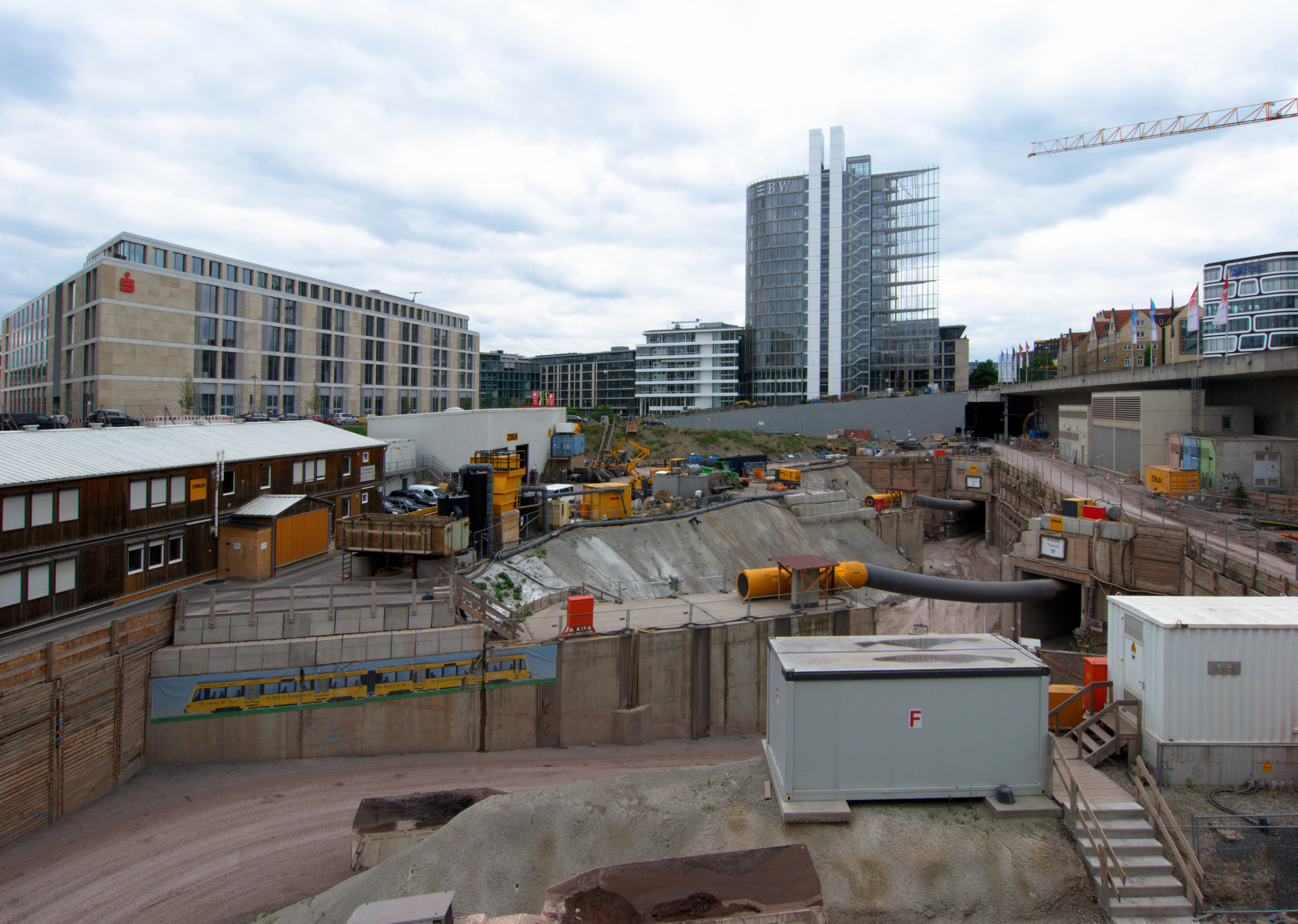 Stuttgart, U-Bahn-Baustelle zwischen Heilbronner Straße und Stadtbibliothek